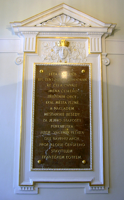 Deska ve štukovém portálu upomínající na osoby spojené se stavbou Měšťanské besedy. Deska se nalezá u hlavního vchodu budovy.